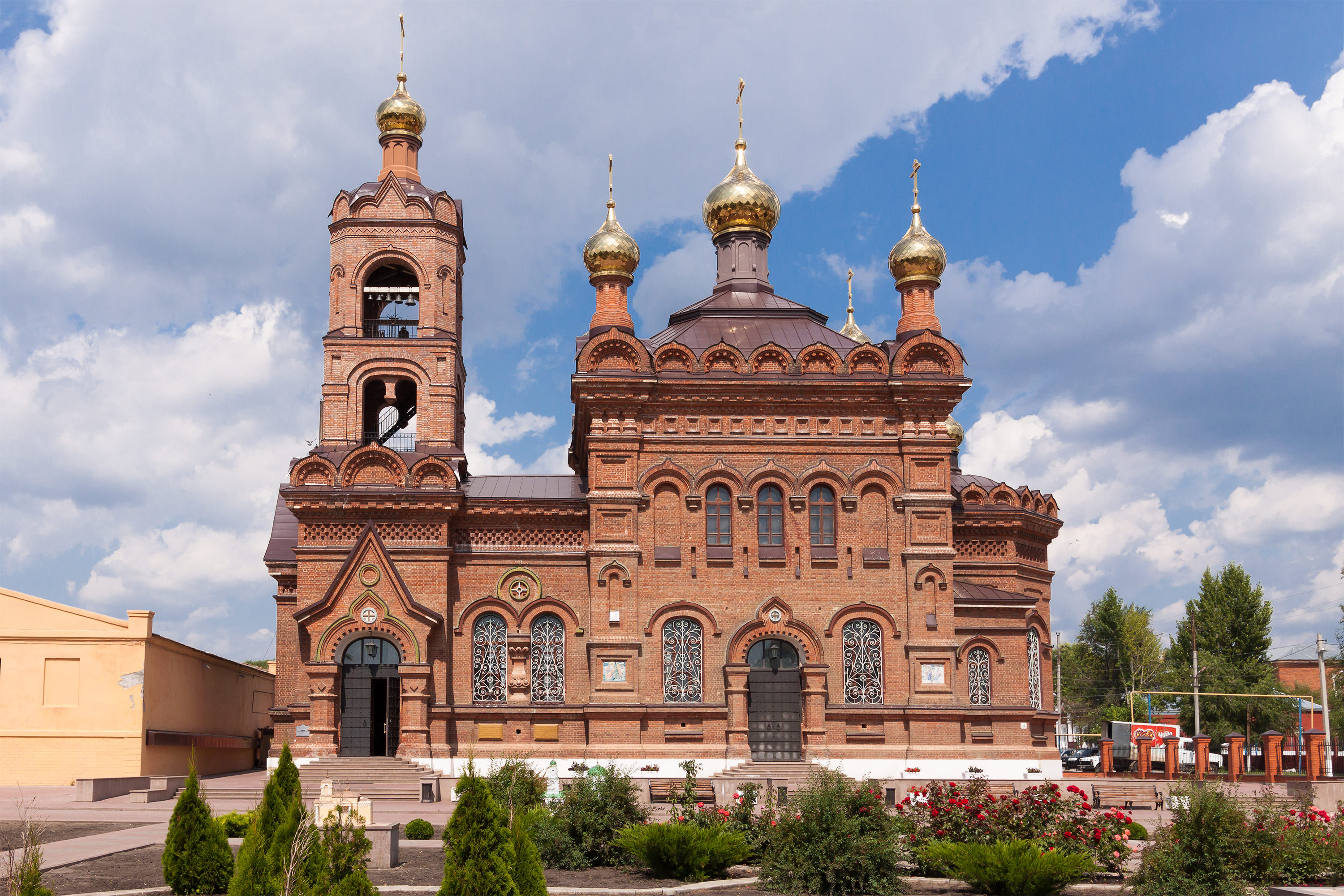 Крестовоздвиженская церковь: улица Достоевского, 10, Хвалынск, Саратовская область